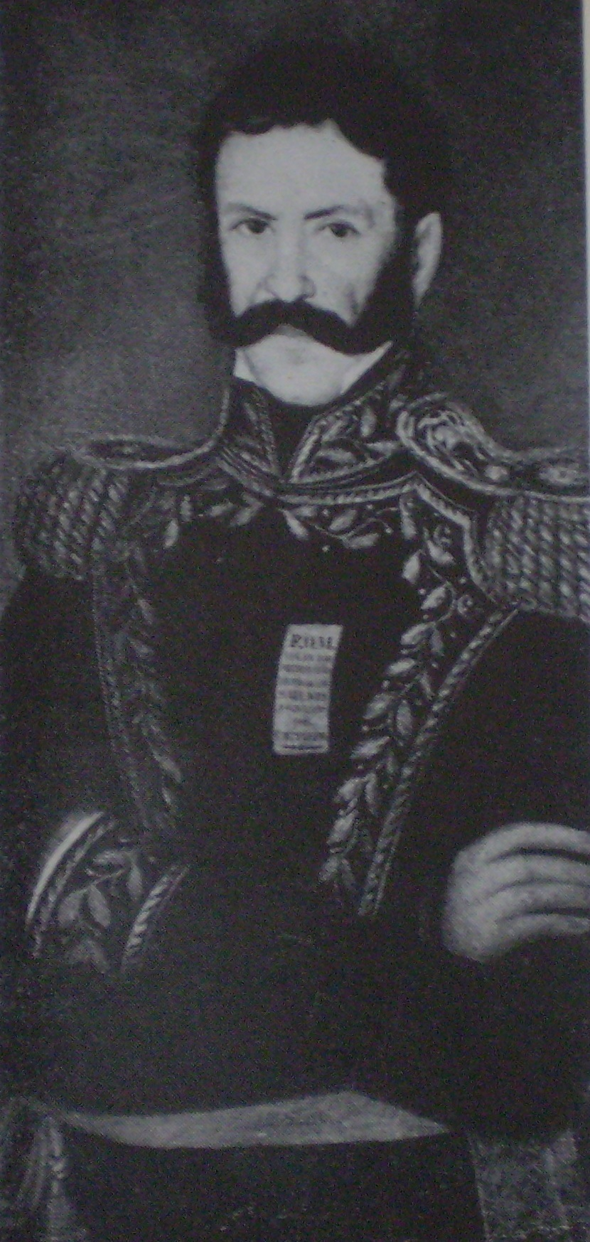 José Félix Aldao(1785-1845). Óleo de García del Molino. Original en el Museo Histórico Nacional